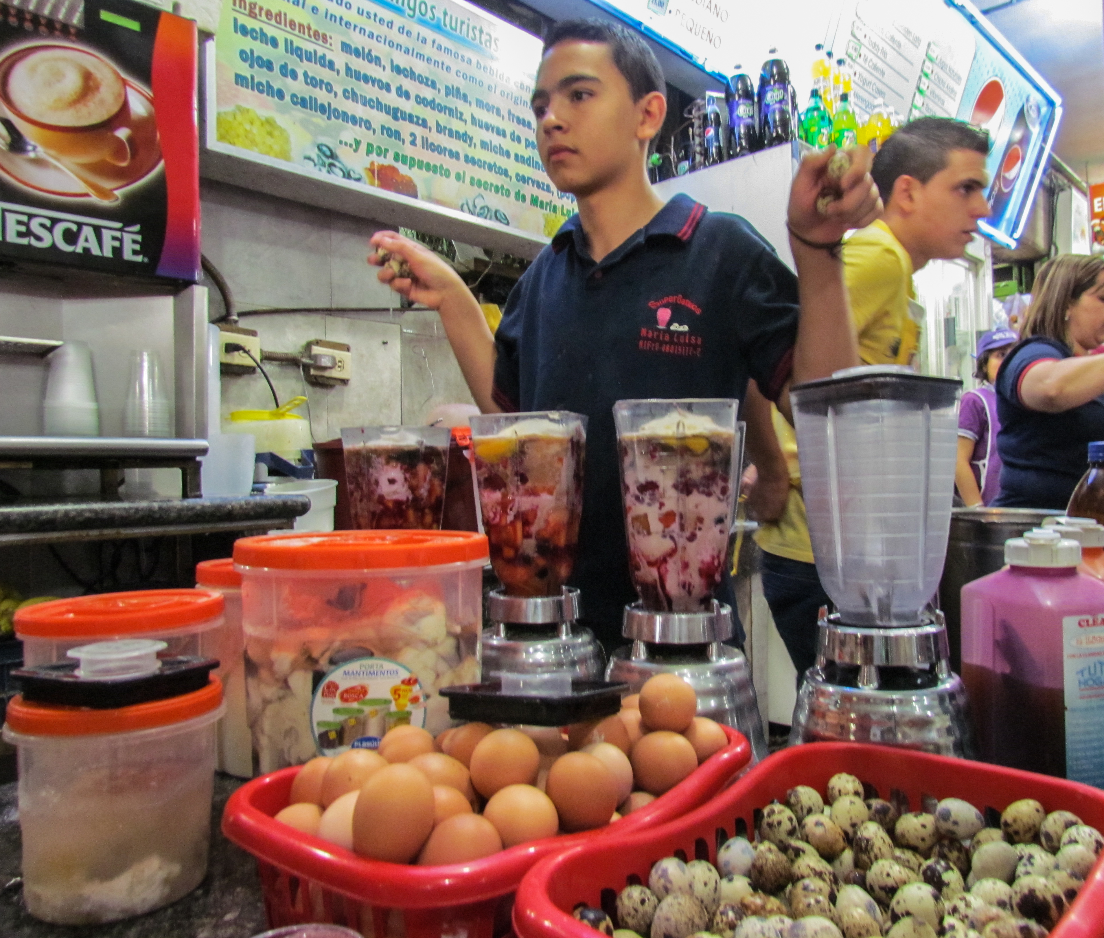 Levantón Andino en el Mercado de la ciudad de Merida, Venezuela. El levanton es una bebida tipica de Merida, sus ingredientes Huevos de Codorniz, Huevas de Pescado, Ojo de Buey, Fresas, Brandy, Vino Tinto, Leche, entre otros. El levantón andino mas famoso se consigue en el Mercado Principal de Mérida